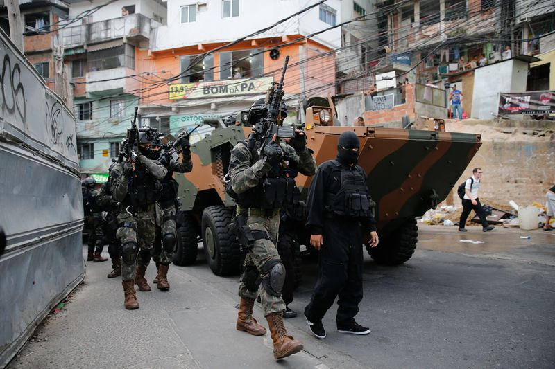 Militares realizando operação, no dia 22 de setembro de 2017, na favela da Rocinha após guerra entre quadrilhas rivais de traficantes pelo controle da área.